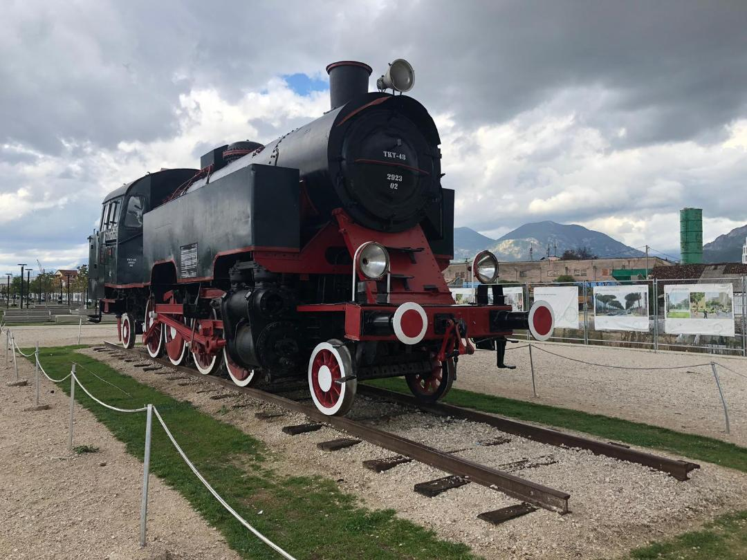 Lokomotiva në kujtim të stacionit të trenit në bulevardin e ri në Tiranë. (tetor 2019)